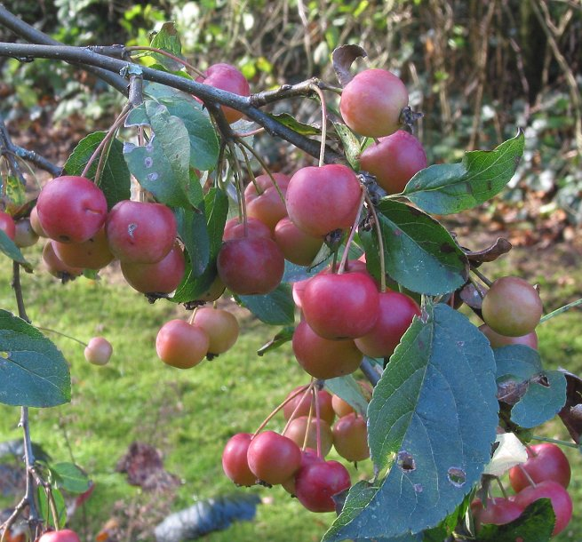 Sierappel vruchten van Malus × robusta 'Red Sentinel'; eind oktober.